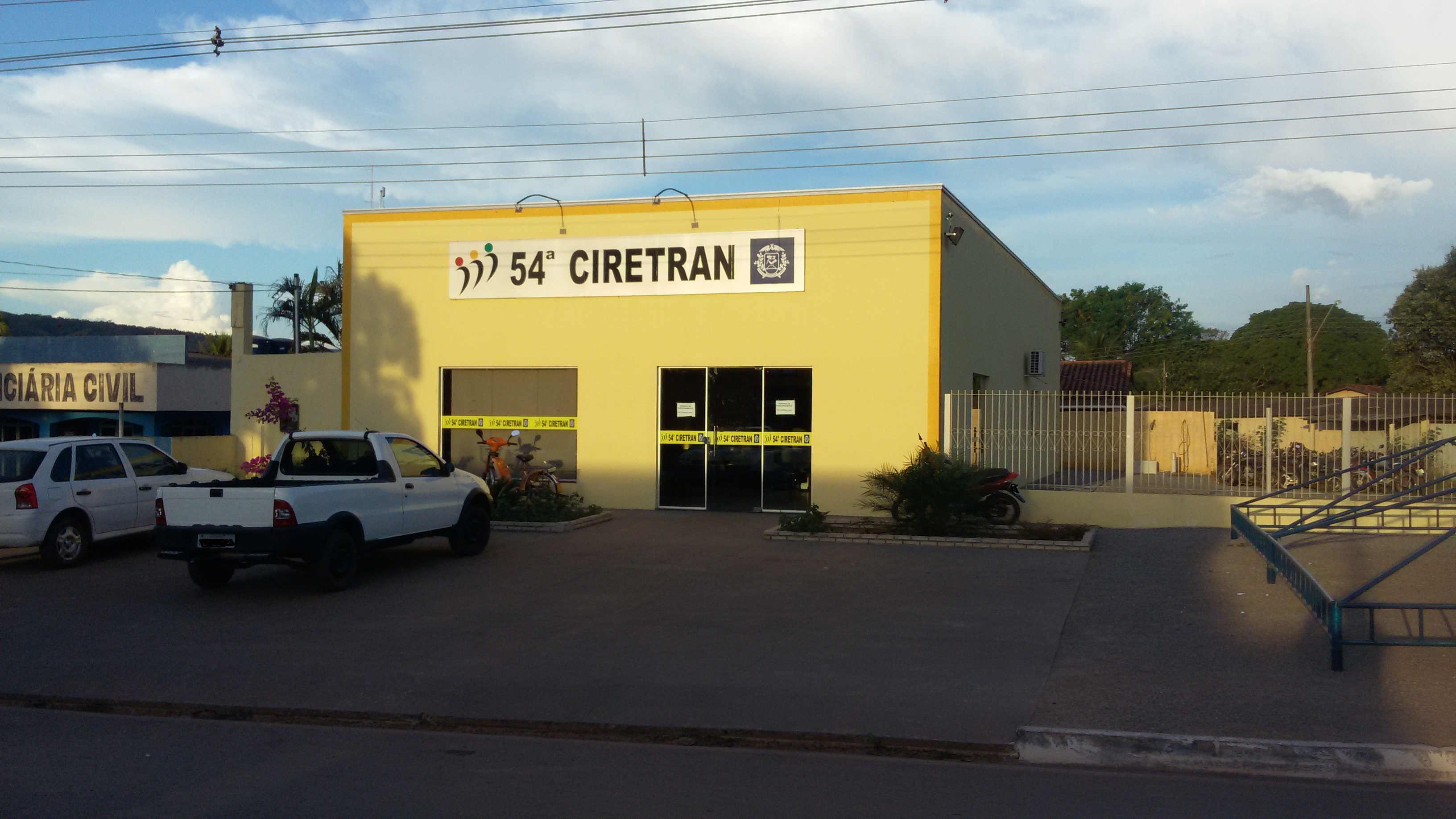 Ciretran da cidade de Nobres